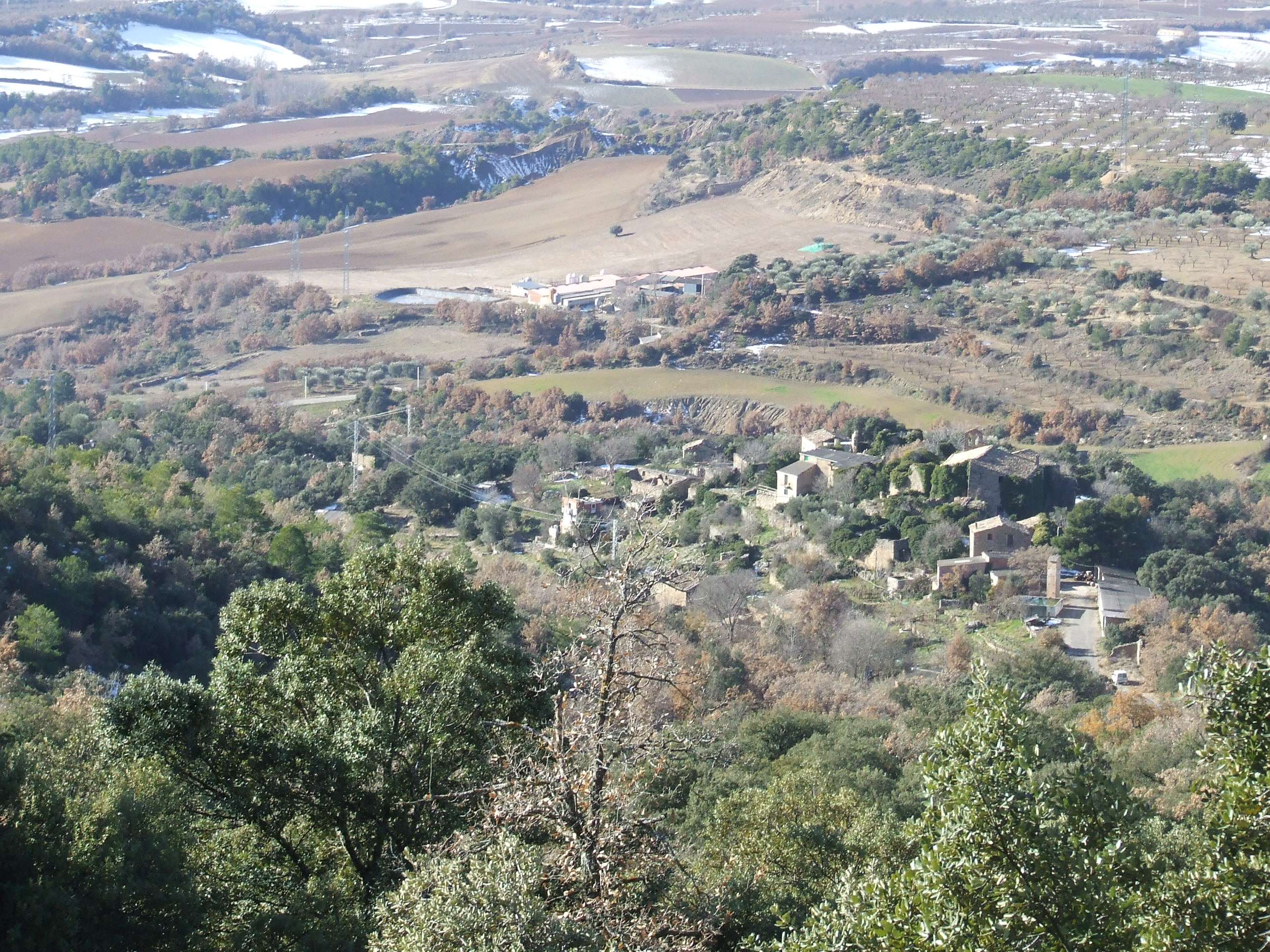 El poble de Llordà des del camí del castell (Isona i Conca Dellà, Pallars Jussà)